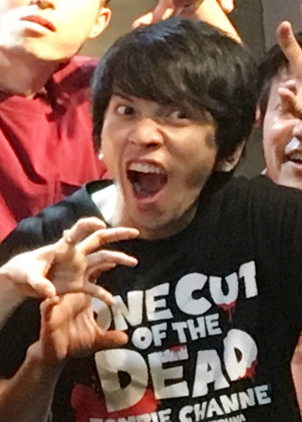 曽我真臣（2018年8月8日、LOFT9 Shibuya）